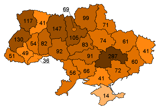 Розподіл загиблих у ході антитерористичної операції представників силових структур України до 15 квітня 2015 р. за місцем народження / Ukraine military losses (to 15.04.2015) by place of birth